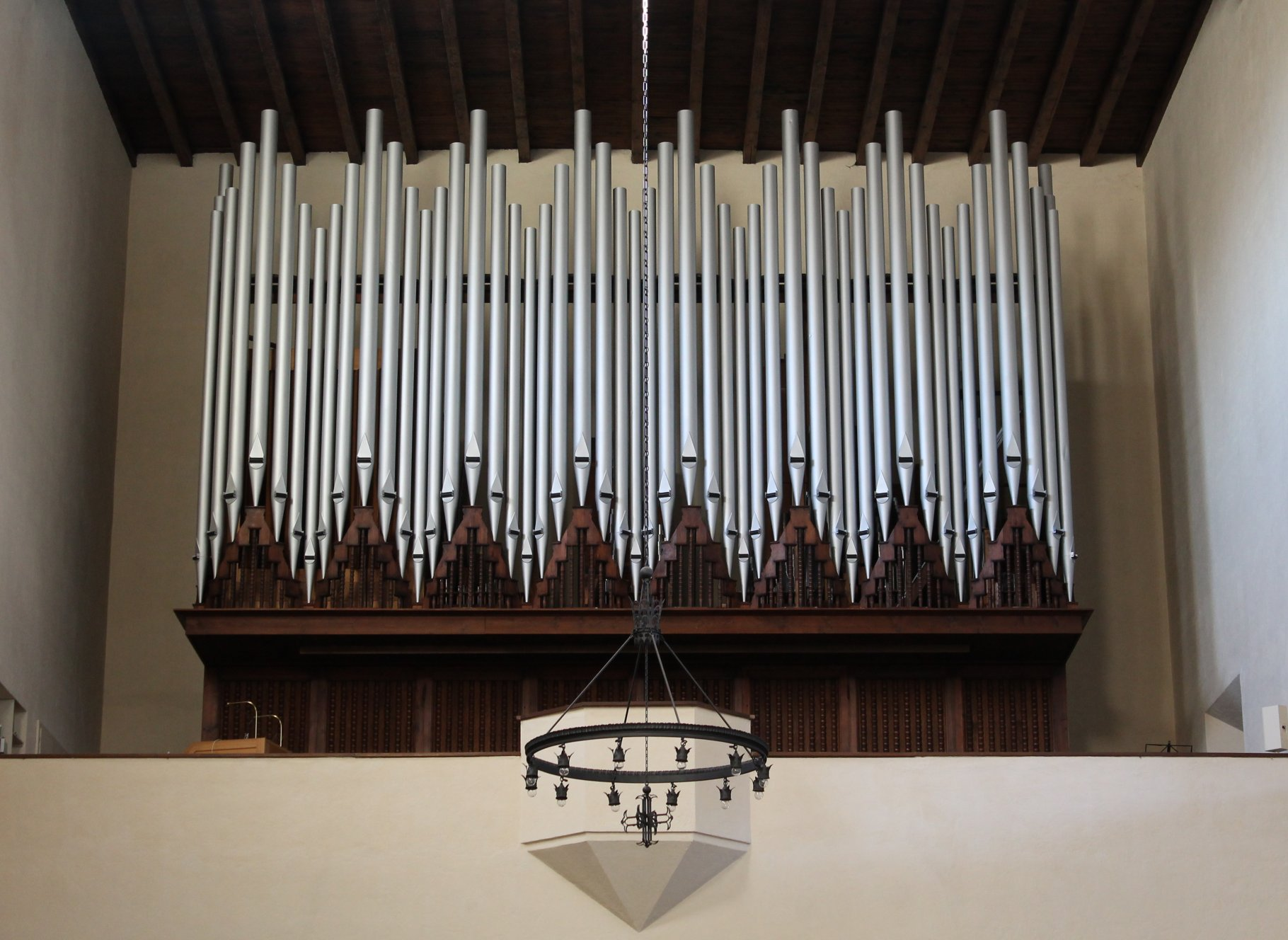 Orgel von Leiden Christi in München (1964, Zeilhuber, III/40)